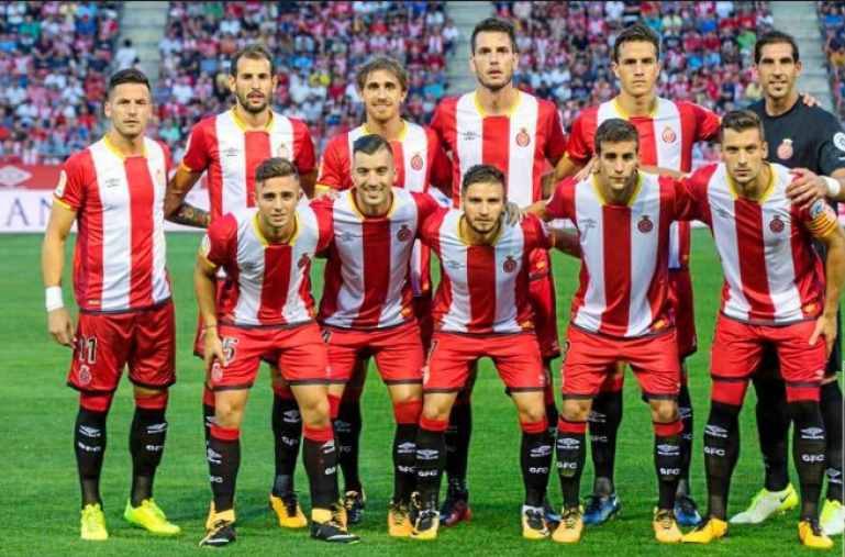 Equip del Girona Fc 2018